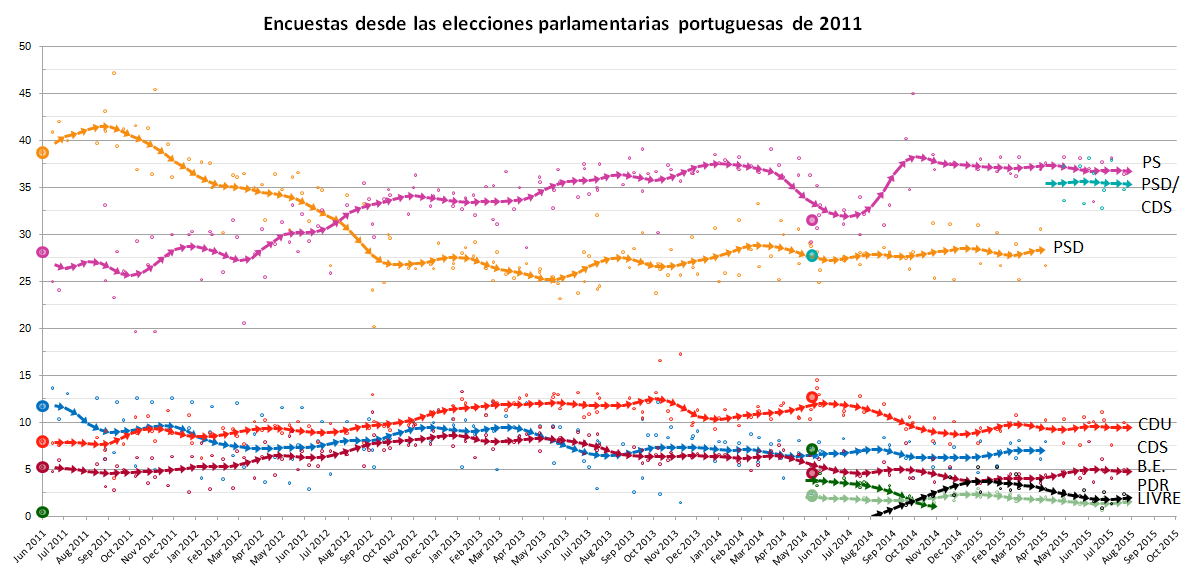 Média quinzenal dos resultados das sondagens 2011-2015 - Portugal